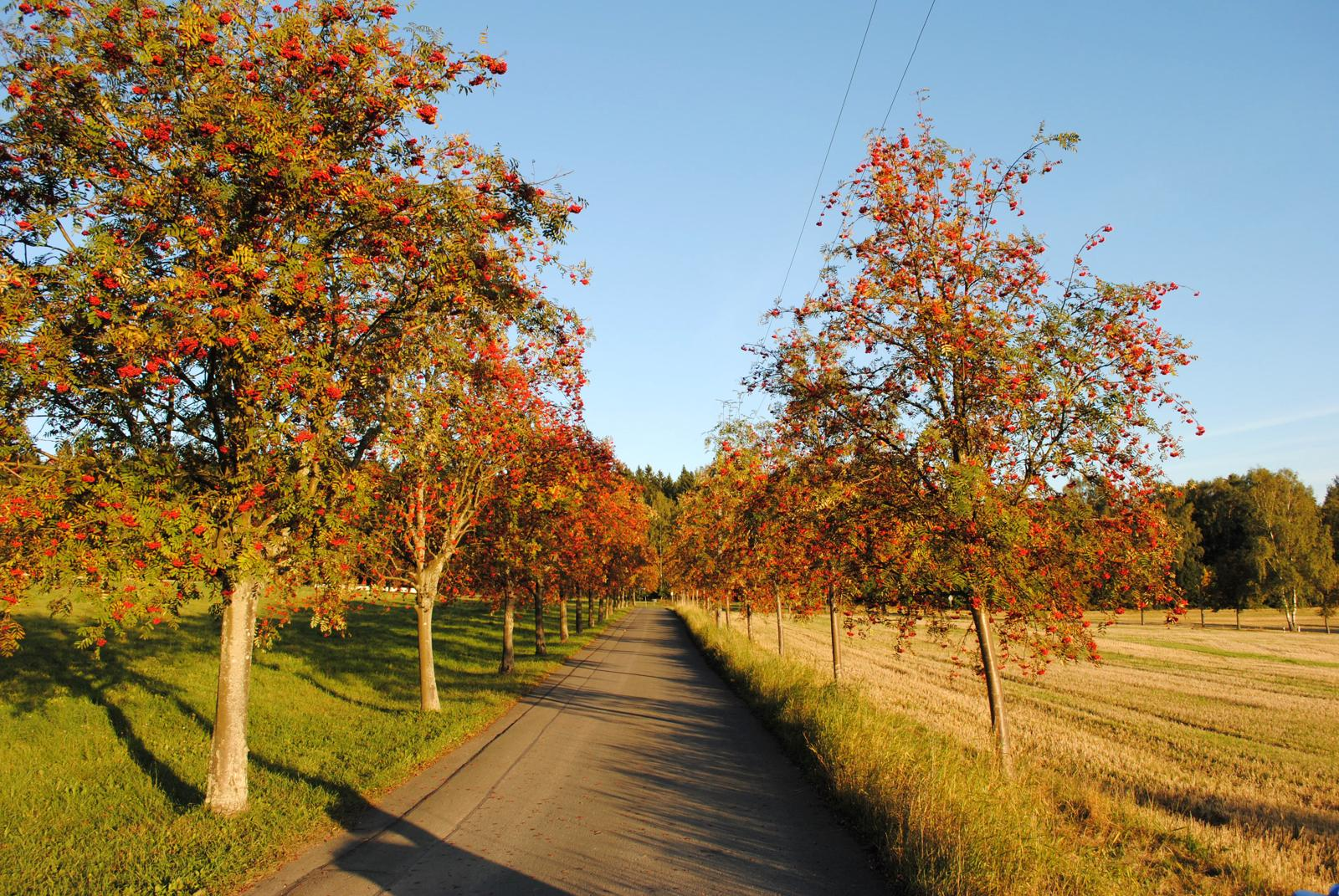 Allee mit Vogelbeerbäumen (Sorbus aucuparia) in Wernitzgrün, Vogtland.